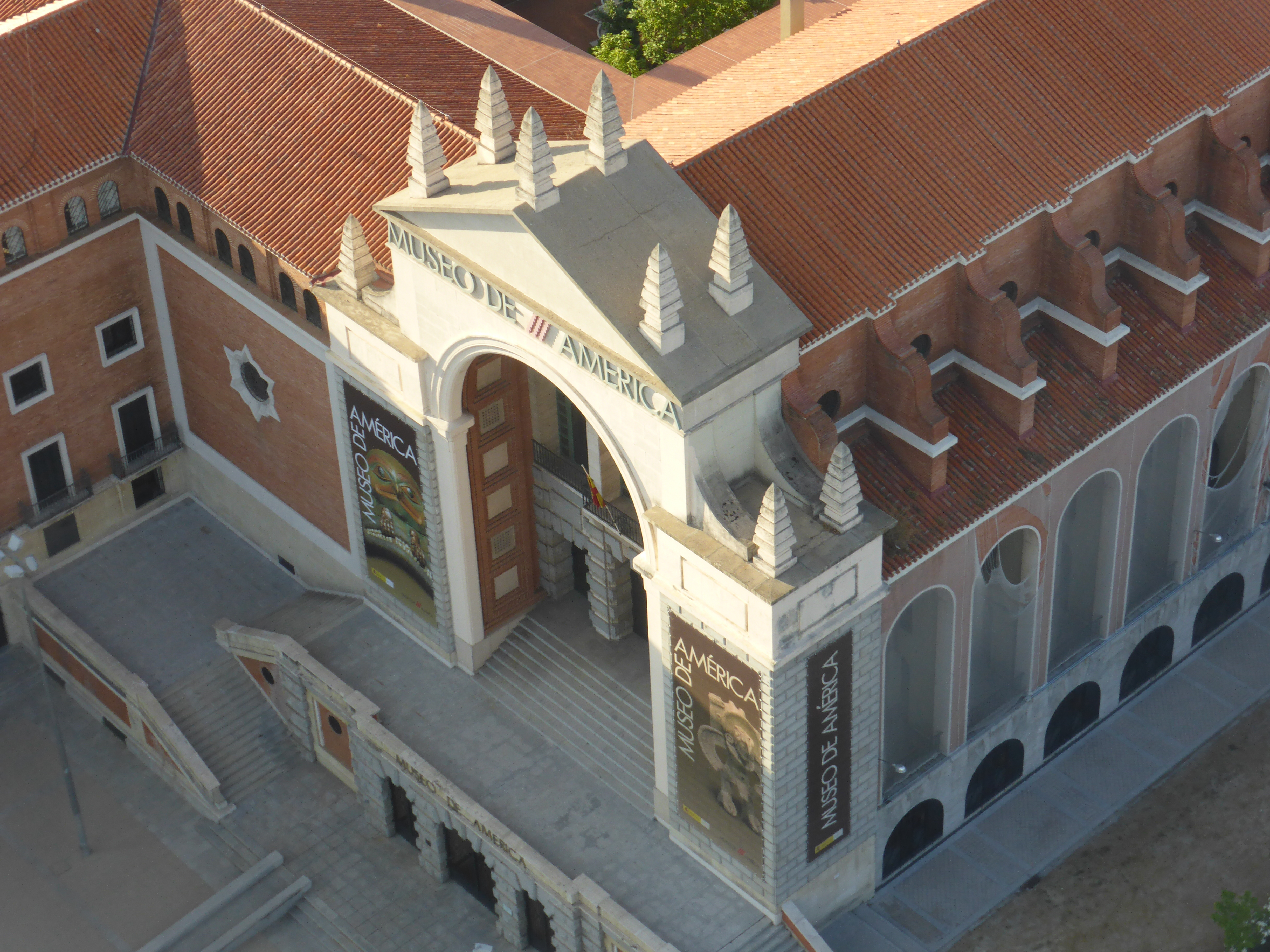 Detalle de la fachada principal del Museo de América, en Madrid. Esta sede definitiva fue inaugurada en 1965. La fotografía está tomada a 92 metros de altura, desde el Faro de Moncloa.